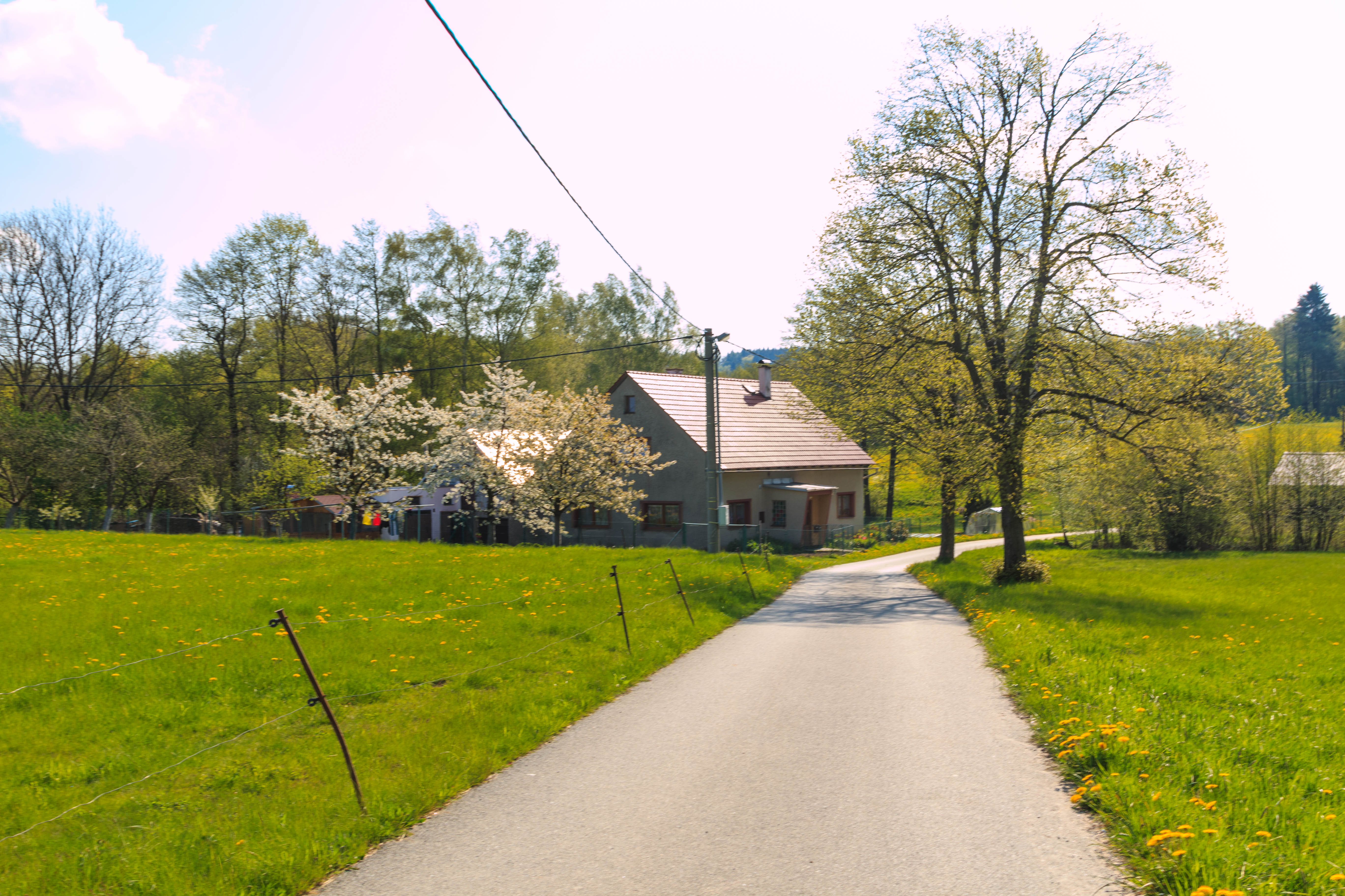 Ruda čp. 2